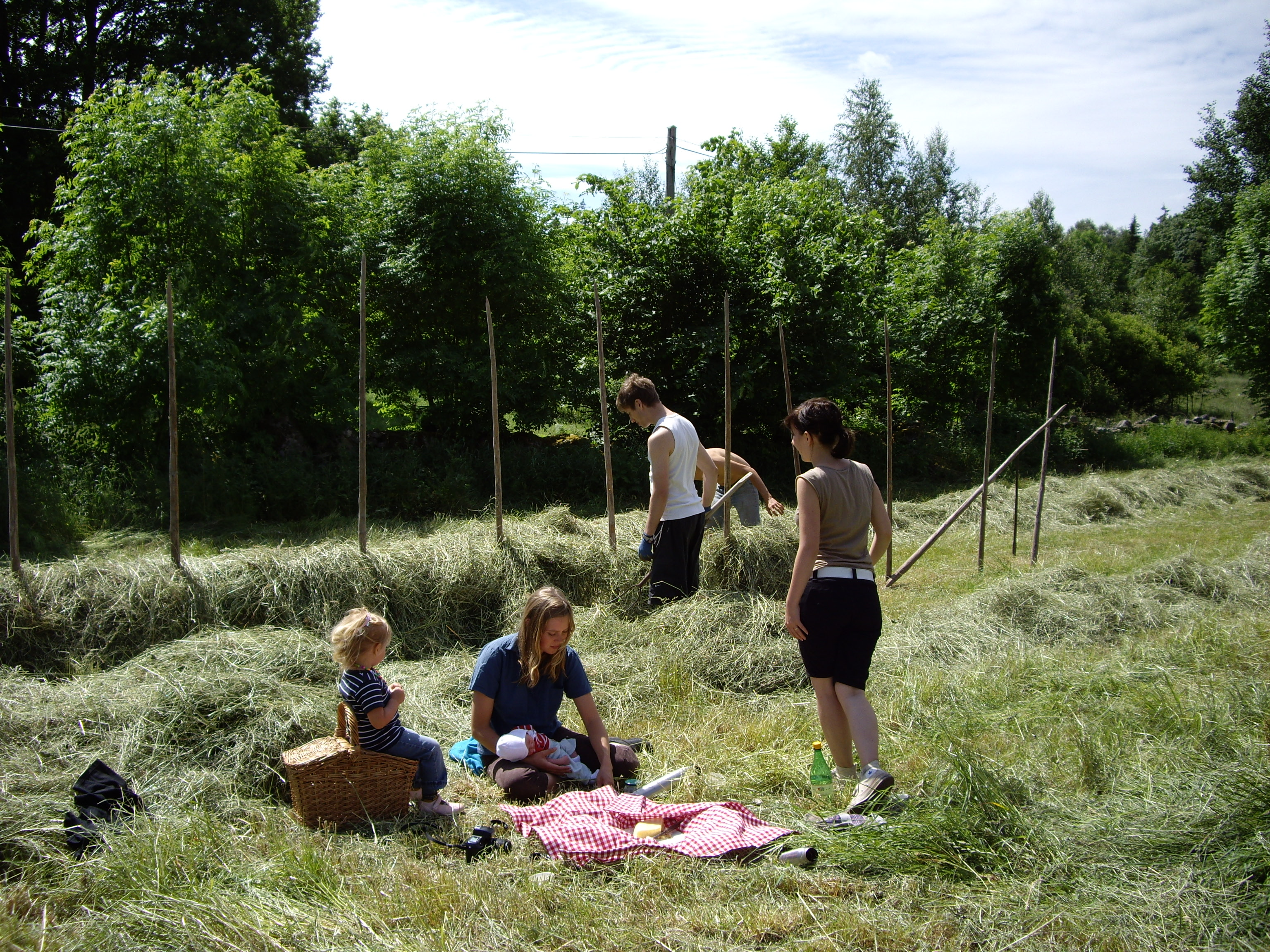 Kaffe och macka på rödrutig filt.